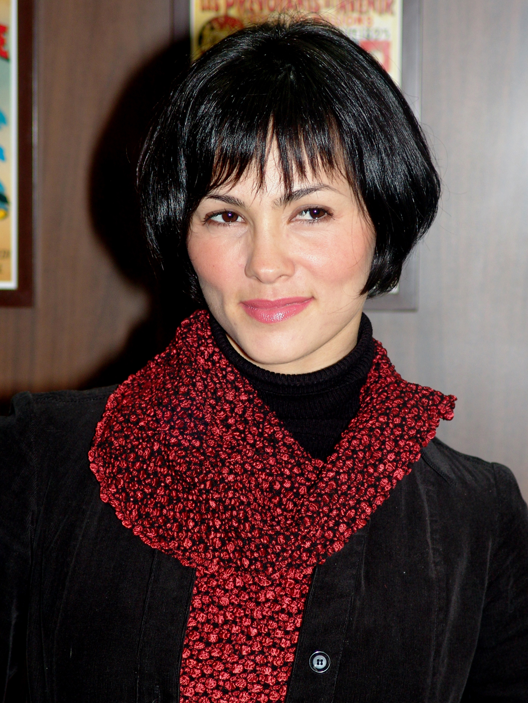 Suzana Alves no coquetel de lançamento da coleção Primavera/Verão (Cabelos) de Franck Provost.